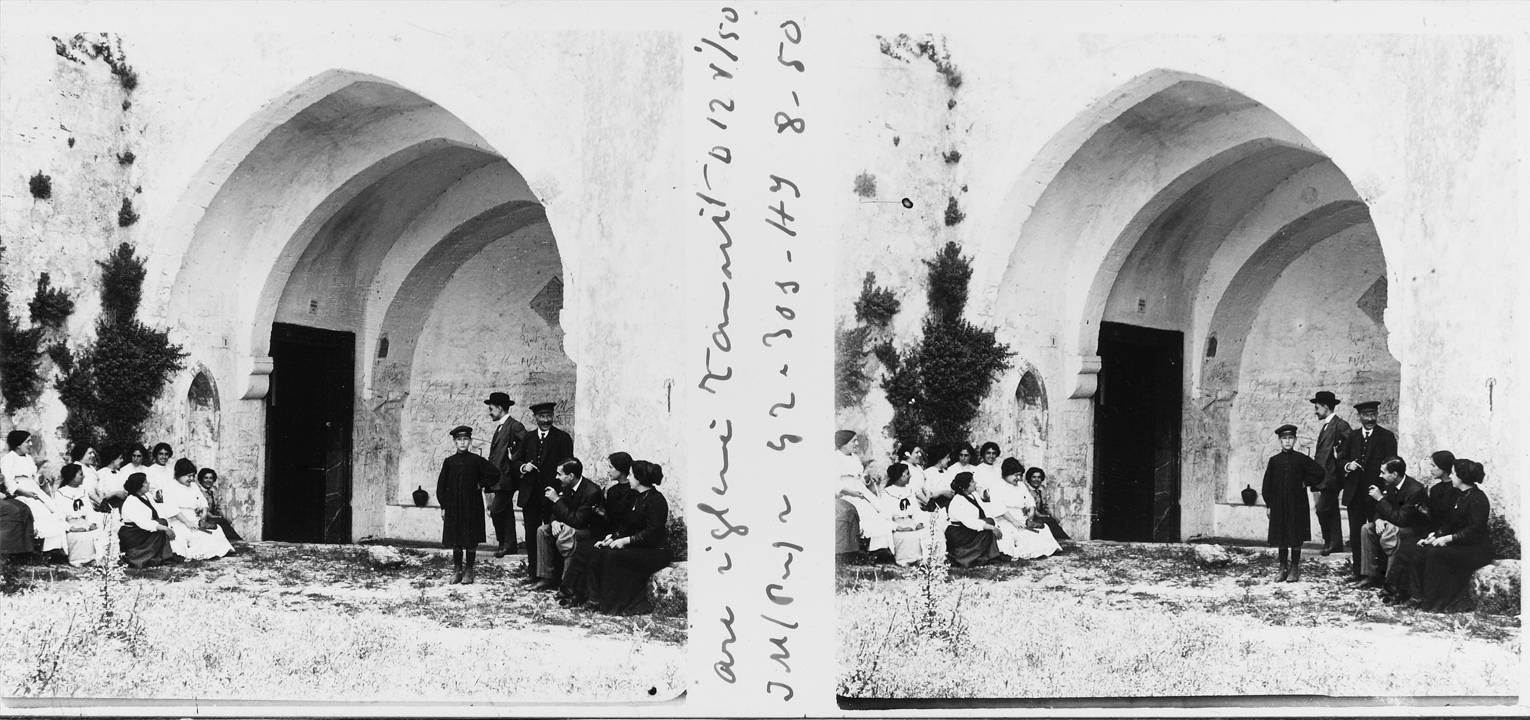 Arc de l'església de Tamarit. Josep Salvany i Blanch (1912)